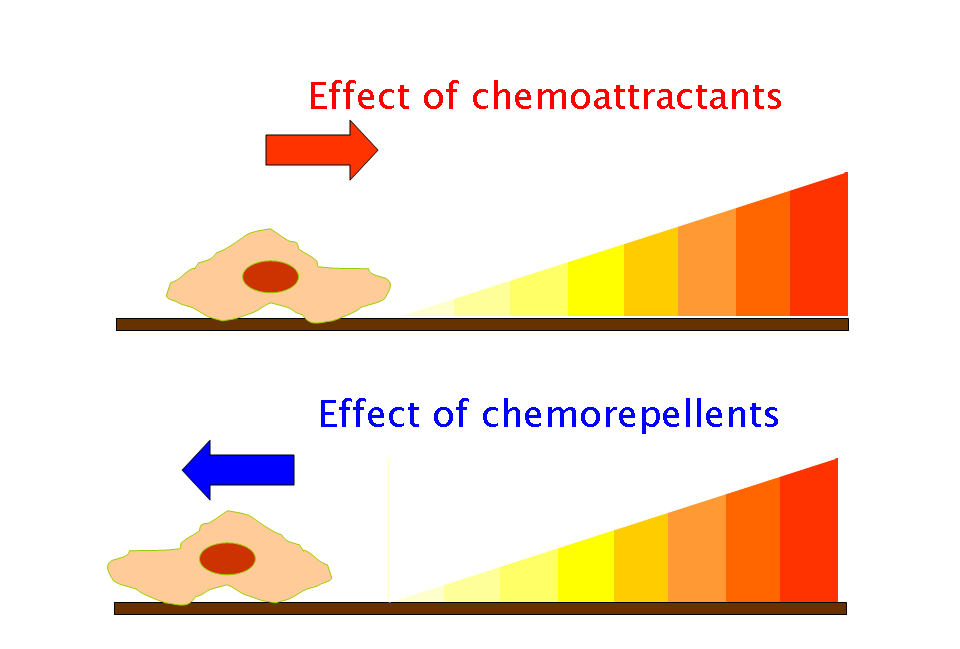 Chemotaxis-Attractant-Repellent